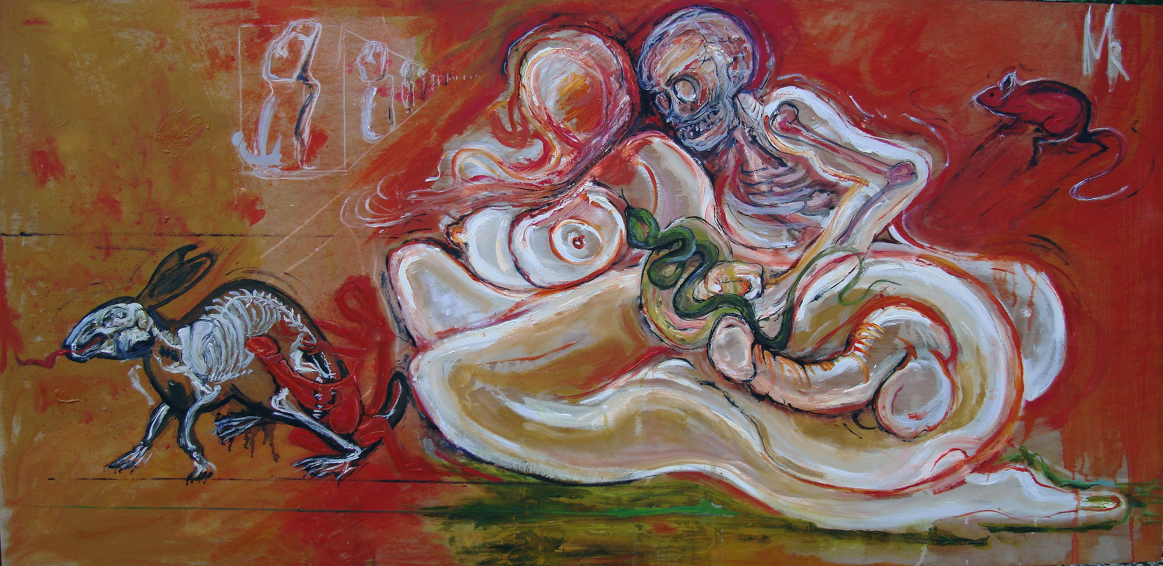 Richard MAROLLE Huile et techniques mixtes sur panneau 300 X 135 cm. Collection privée RUSSIA.